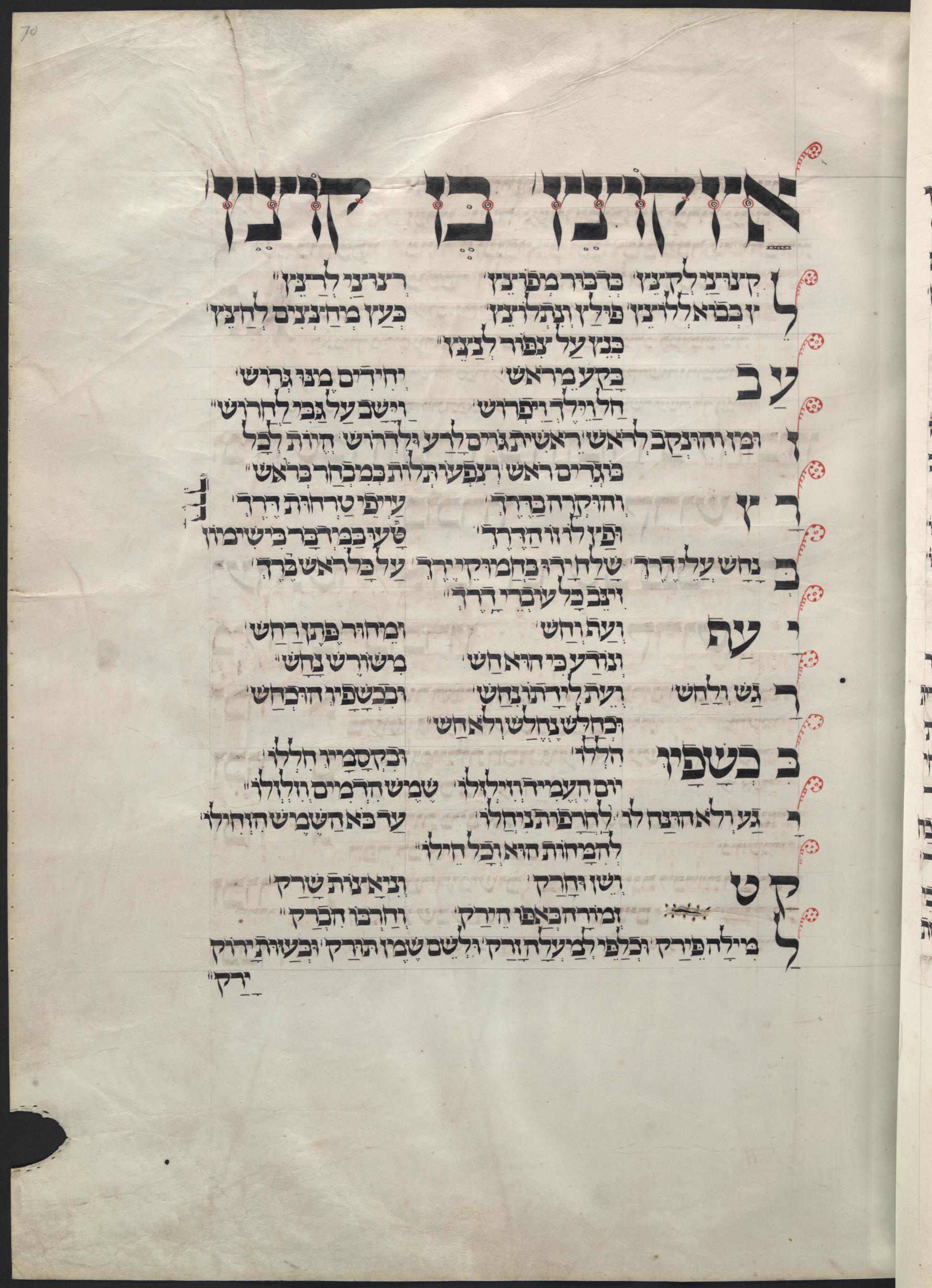 הפיוט 'אץ קוצץ' לשבת זכור, מאת רבי אלעזר הקליר, מתוך מחזור אשכנז כת"י דרזדן A.46.a עמוד 70א